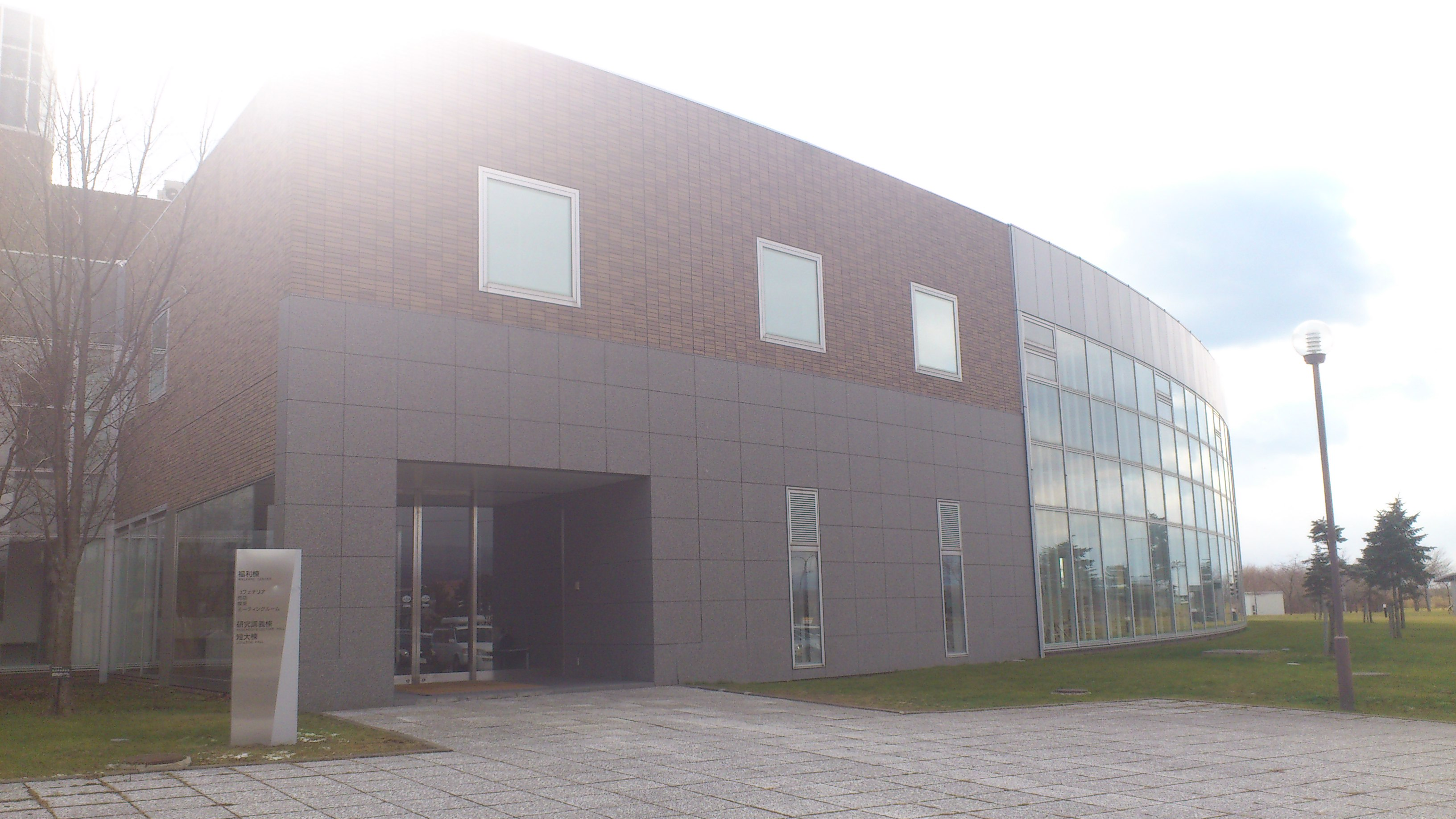 苫小牧駒澤大学（学生玄関）